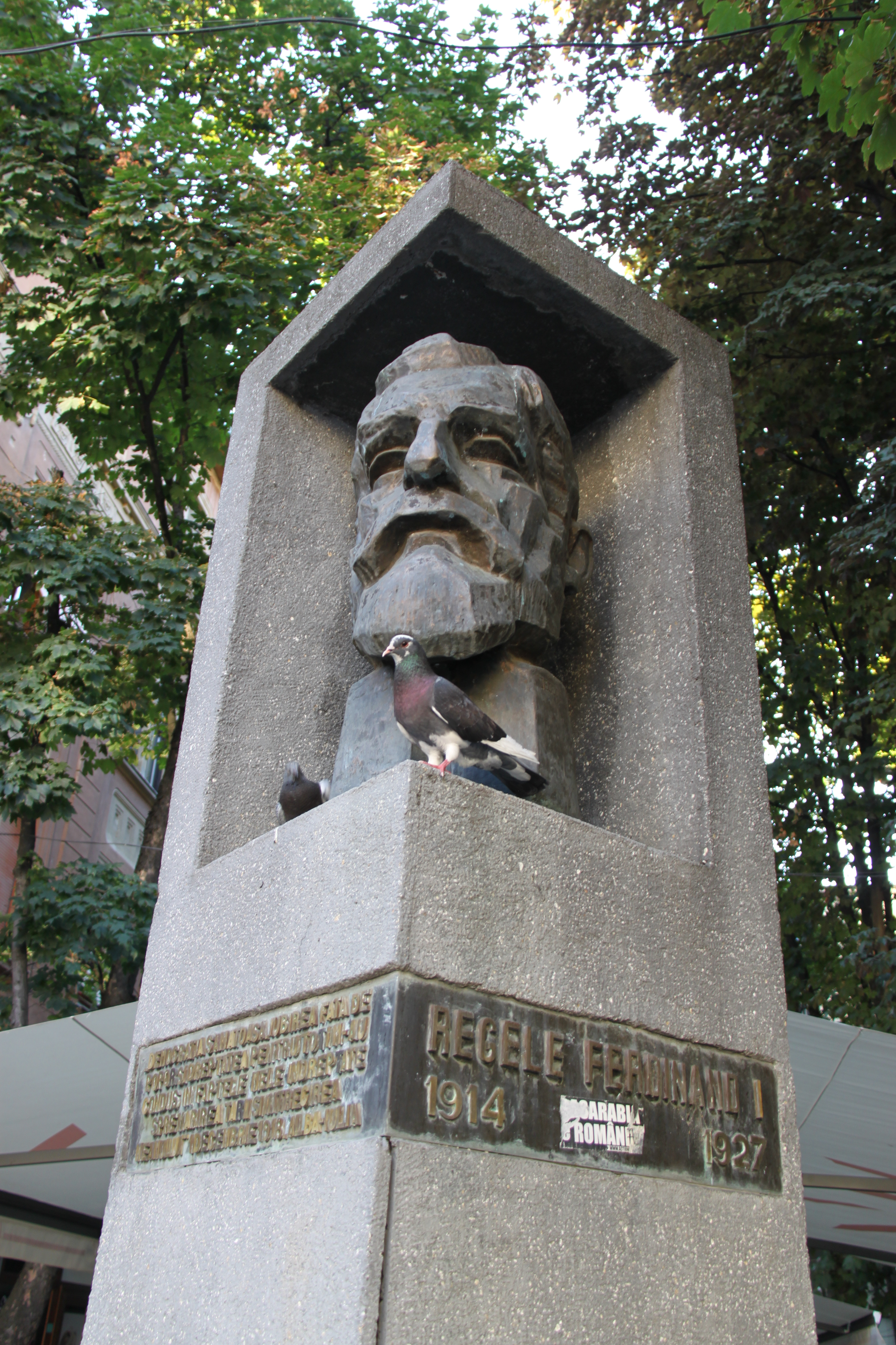 Ferdinand I of Romania (Timișoara).jpg